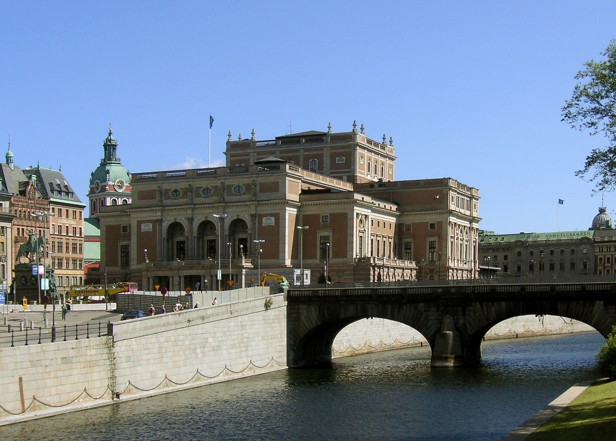 Kungliga Operan i Stockholm, vy från Helgeandsholmen